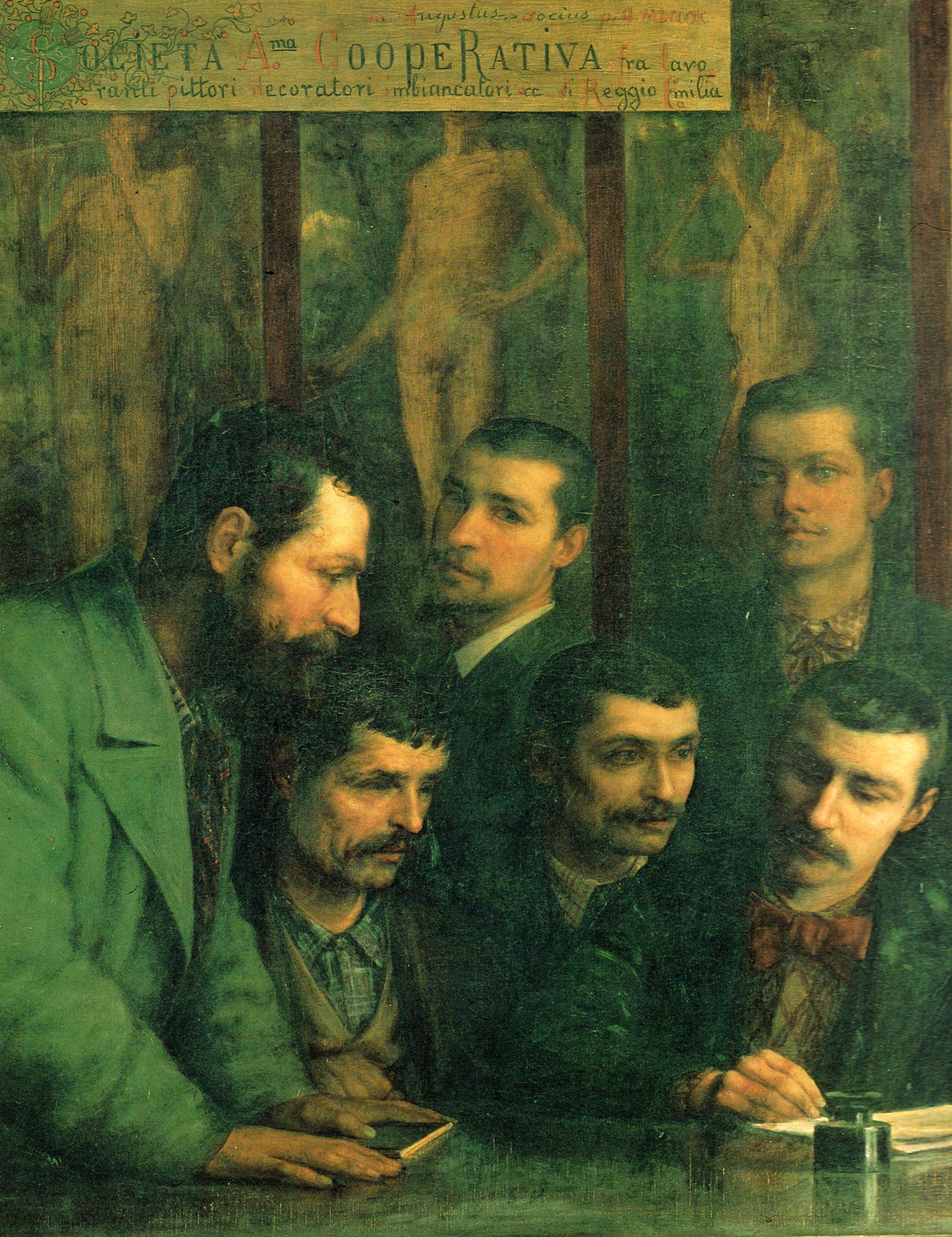 La foto rappresenta l'opera di Fra Paolo - Augusto Mussini descritta nel titolo, conservata nella chiesa dei Cappuccini di Ascoli Piceno.